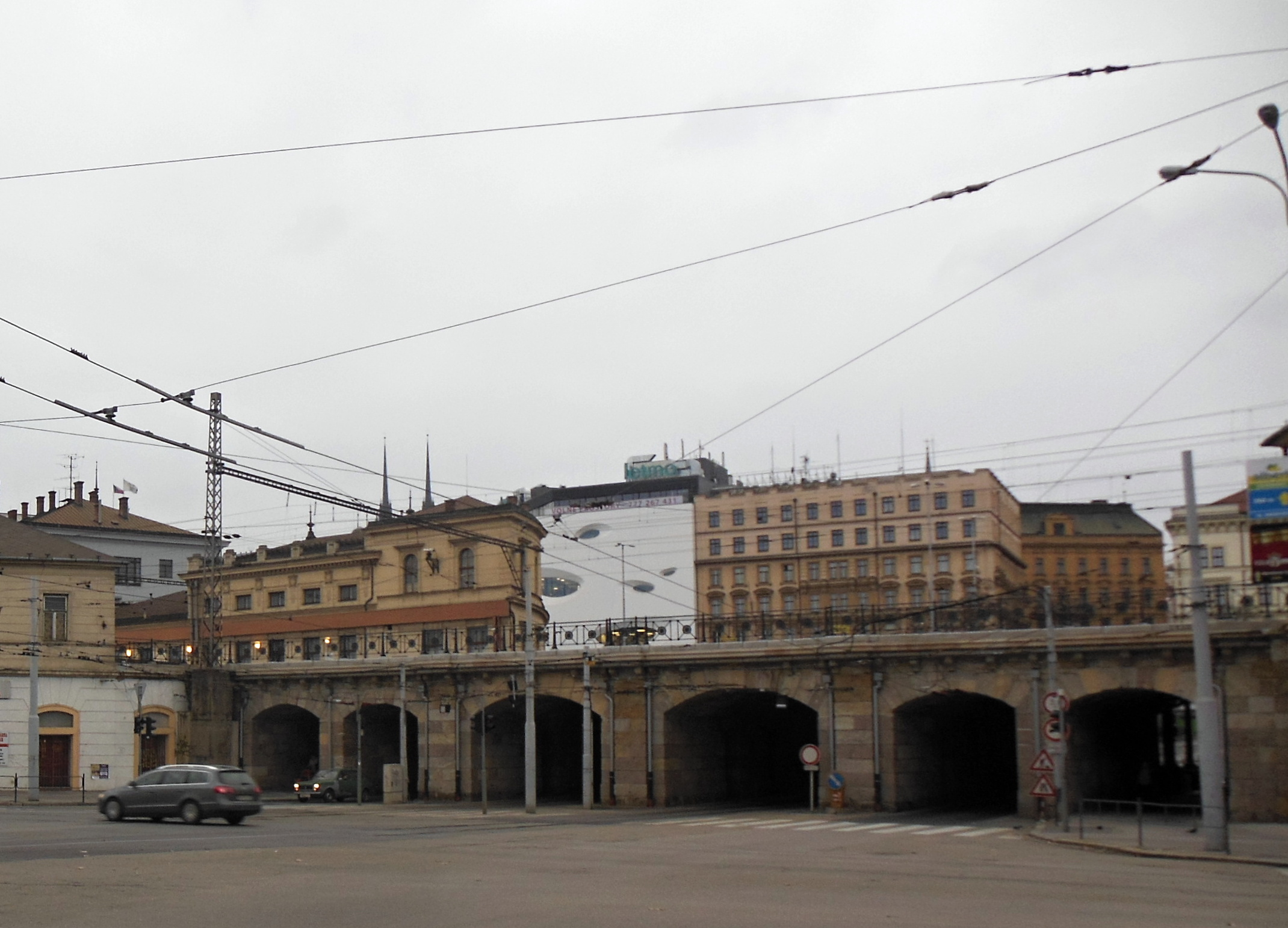 Brno-Trnitá. Křižovatka ulic Křenová, Dornych, Koliště a železniční viadukt, pohled z Křenové.